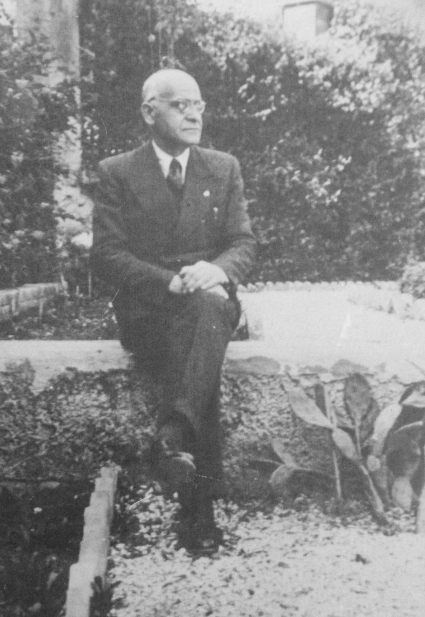 Aldo Valori